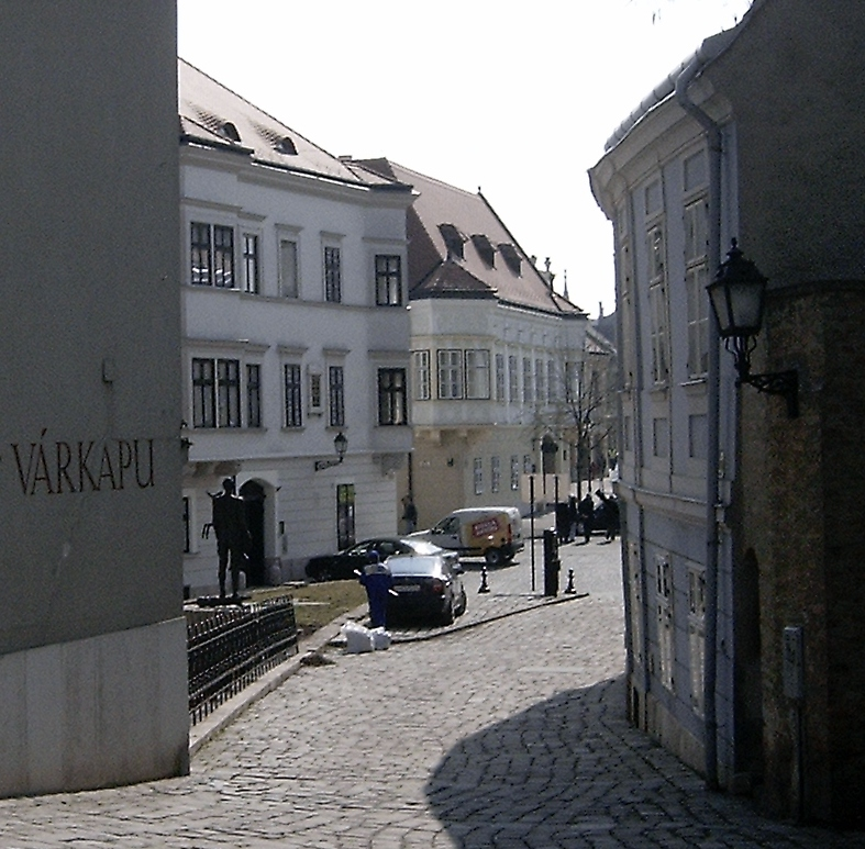 Bécsi kapu tér a Káptalandombról (Győr, Győr-Moson-Sopron megye)